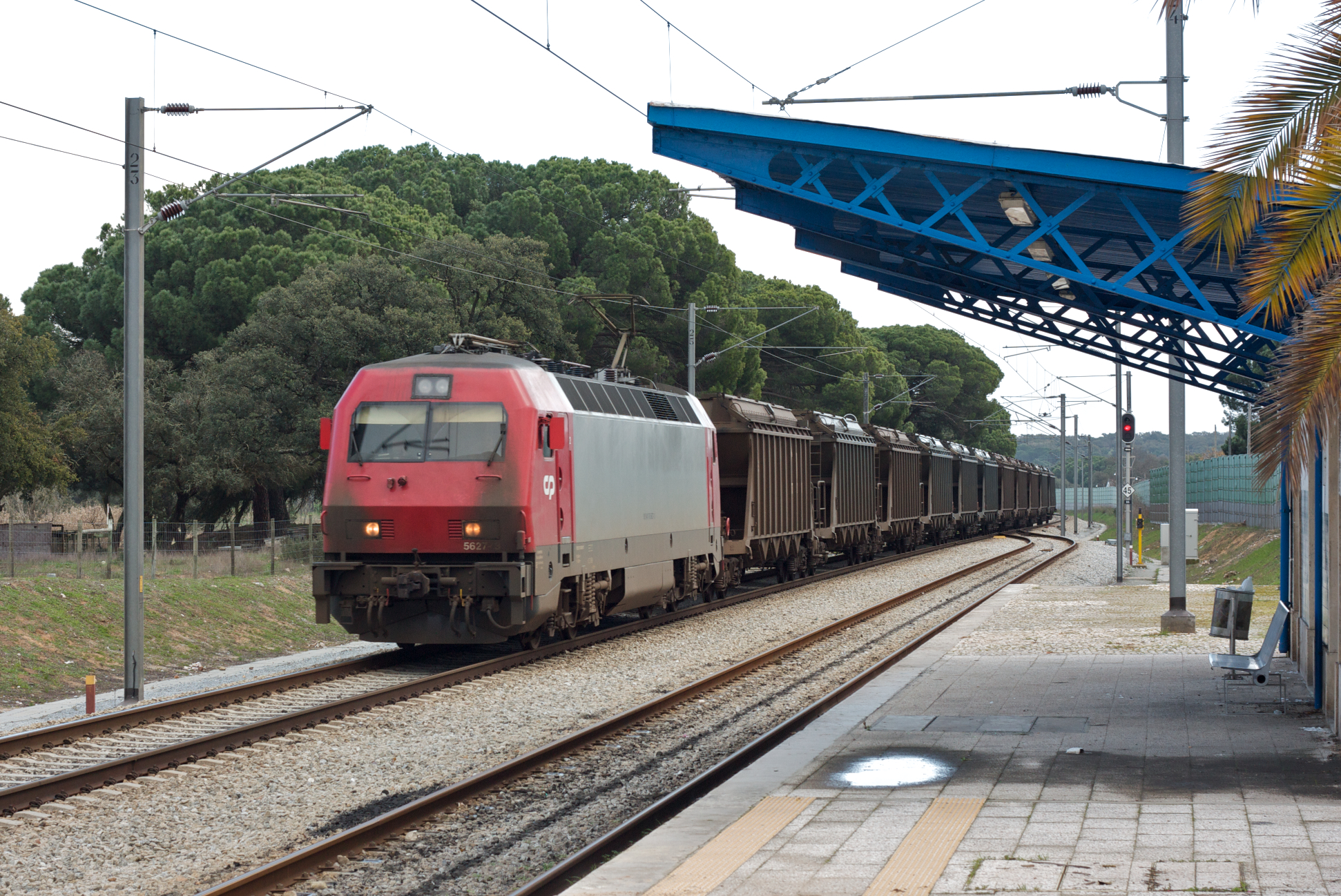 Tipo: Comboio de Transporte de Carvão 96208 [Sines - Pego] Local: Estação de Canal Caveira [Linha do Sul, PK 109] Data e hora: 2 de Fevereiro de 2009 [14h47] Material: Locomotiva 5627 + 11 vagões CP Uaoos